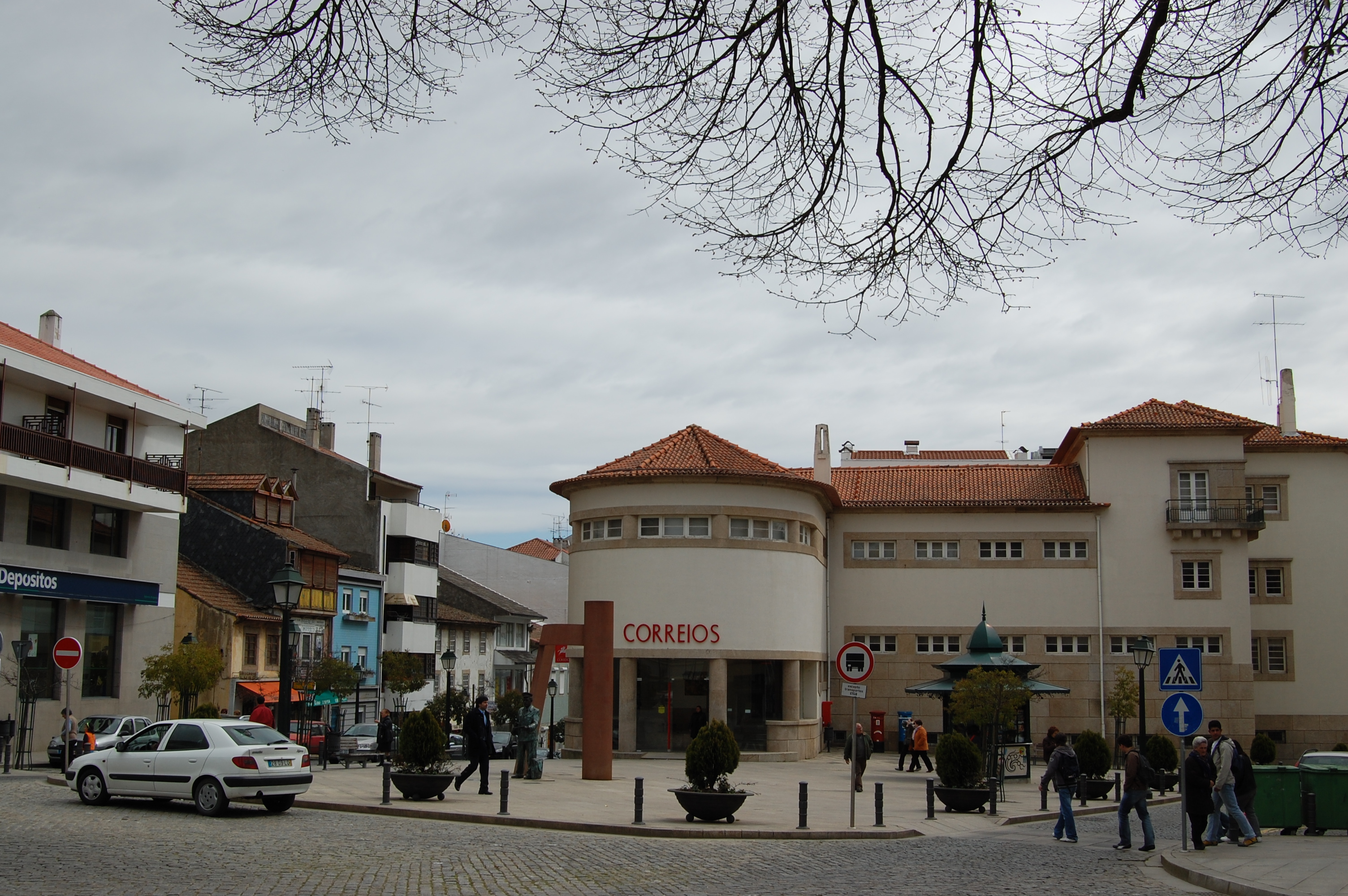 A cidade de Bragança, no nordeste de Portugal.